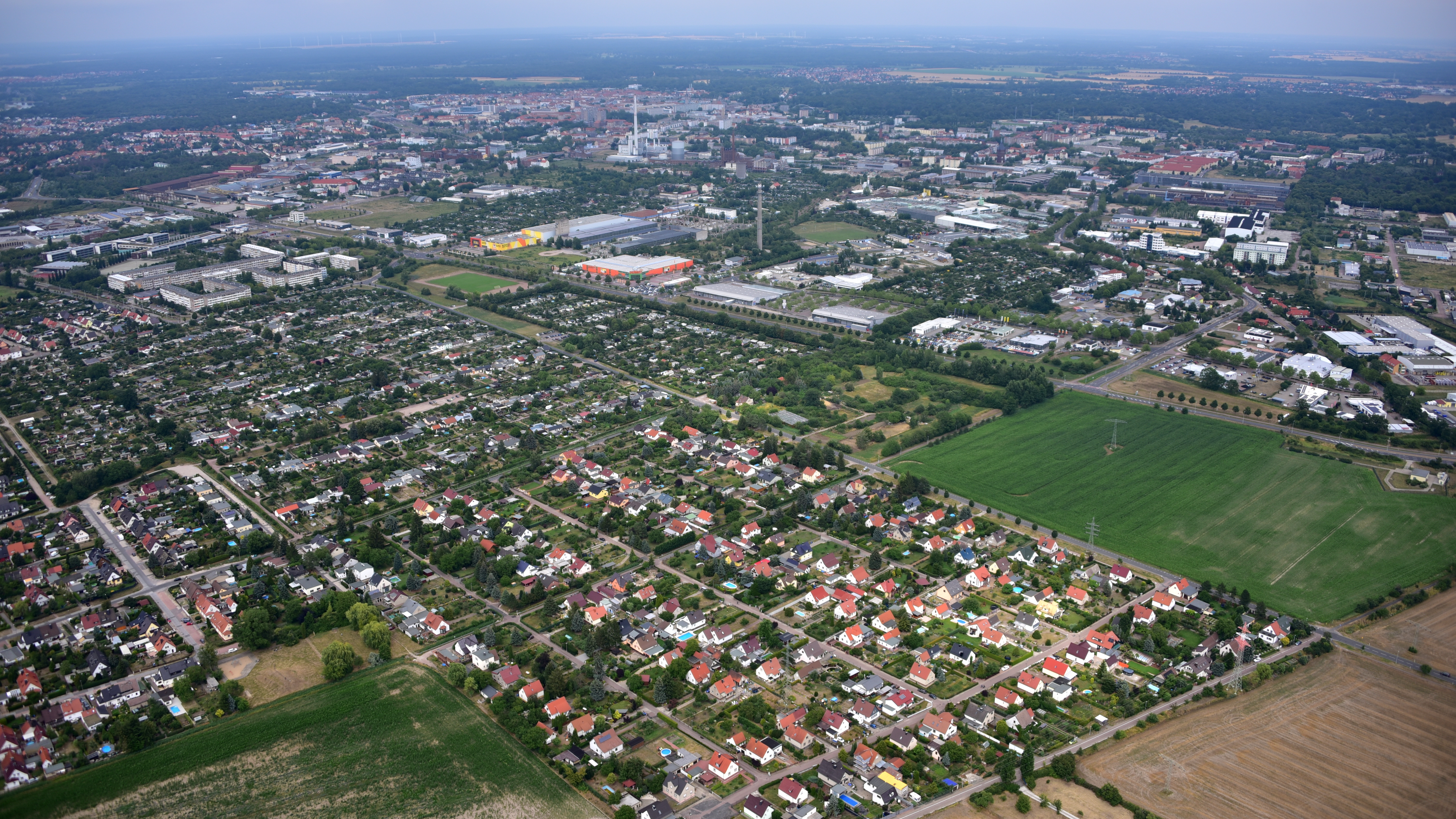 Dessau, Luftaufnahme (2019)